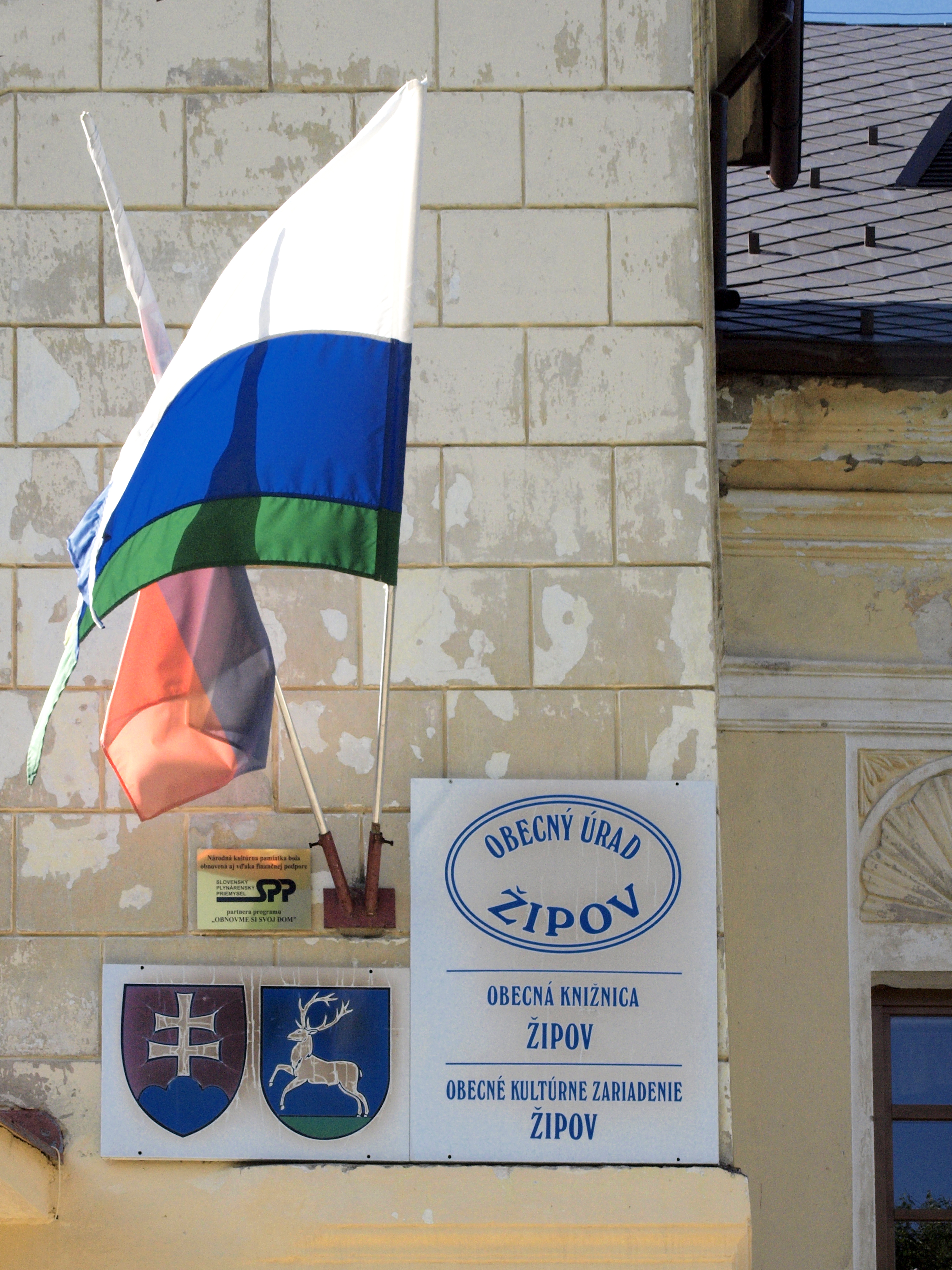 Žipov (Slovakia) - Le bureau municipal (Obecný úrad)